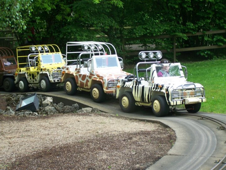 Safary trophy a Walygator Parc